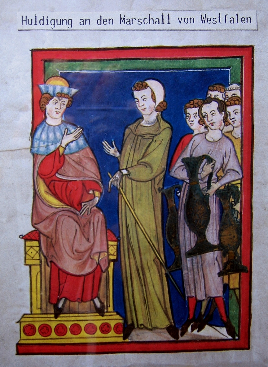 "Huldigung an den Marschall von Westfalen"